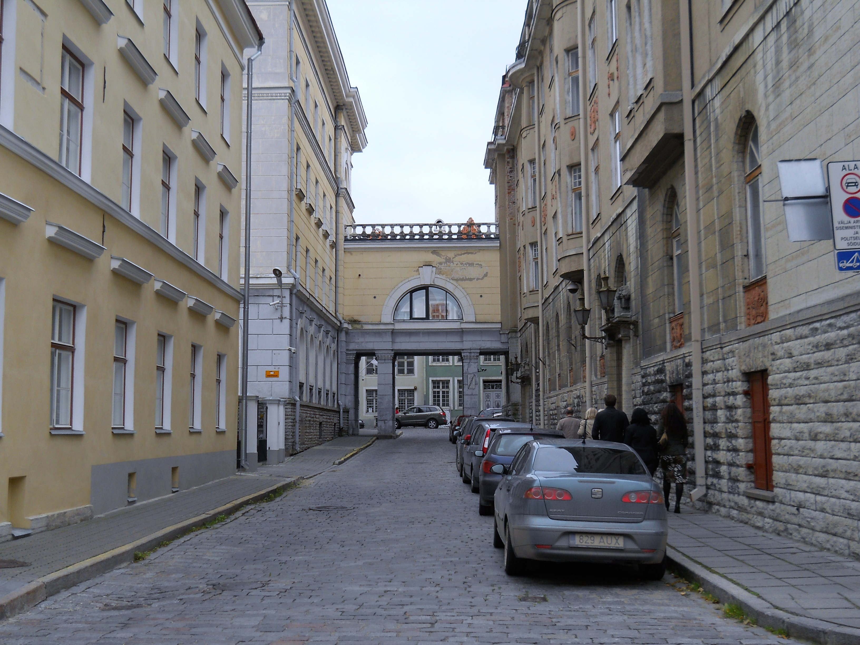 Pagari street in Tallinn